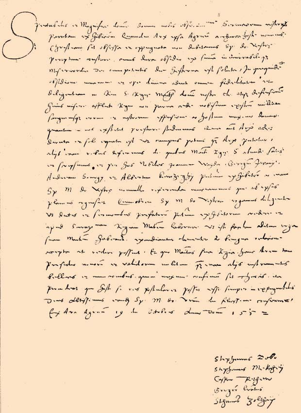 Dobó István és társai levele Nádasdy Tamás nádorhoz. Az országos levéltárban őrzött eredeti latinul írt levél Spectabilis et magnifice domine domine nobis observantissime. Serviciorum nostrorum paratam exhibitionem. Quamdiu arx ipsa Agriensis a thurca hoste nominis christiani sit obsessa et oppugnata, non dubitamus Spectabilis Dominatio Vestra peroptime constare. Cuius dura obsidio ex summa inenarrabilique misericordia Dei omnipotentis die hesterna est soluta. In quaquidem obsidione uivamine et ope diuina adiuti omnem fidelitatem et diligentiam in rem. S. Regie Majestatis domini nostri clementissimi atque defensionis huius misere afficti regni non parva cede nobiscum existencium militum sanguinisque eorum et nostrorum effusione ac hostium maximo damno, quantum a nobis exstitit, prestare studuimus. Quia autem arx adeo diruta et solo equata est, ut campus potius, quam arx putetur, aliis etiam rebus defecimus, de quibus Majestati Regie S. abunde satis et scriptsimus et per hos nobiles Joannem Wayda, Georgium Iwany, Andream Somogy et Albertum Kewzeghy presentium exhibitorum ac eciam Sp. M. Dominatinam Vestram nonnulla referenda nunciavimus, que ab ipsis planius cognoscet. Quam ob rem Sp. M. Dominatinem Vestram rogamus diligenter, ut dictis et sermonibus prefatorum presentium exhibitorum credere et apud Sacratissimam Regiam Majestatem laborare, ut isti facilem aditum erga suam Majestatem habeant, exaudiantur clementer et benigna relacione accepta, cito redire possint. Ex quo Majestas Sua Regia hanc arcem tam presidio novorum et validorum militum, quam etiam aliis instrumentis bellicis et municionibus quum maxime confinium sit Thurcis ita provident, quo hosti, si res postularet, possit esse semper inexpugnabilis. Deus altissimus eandem Sp. M. Dominationem Vestram diu felicissime conseruet. Ex Arce Agriensi, 19. die Octobris, Anno Domini 1552. Stephanus Dobó, Stephanus Mekchey, Caspar Pethew, Georgius Literatus, Stephanus Zolthay.